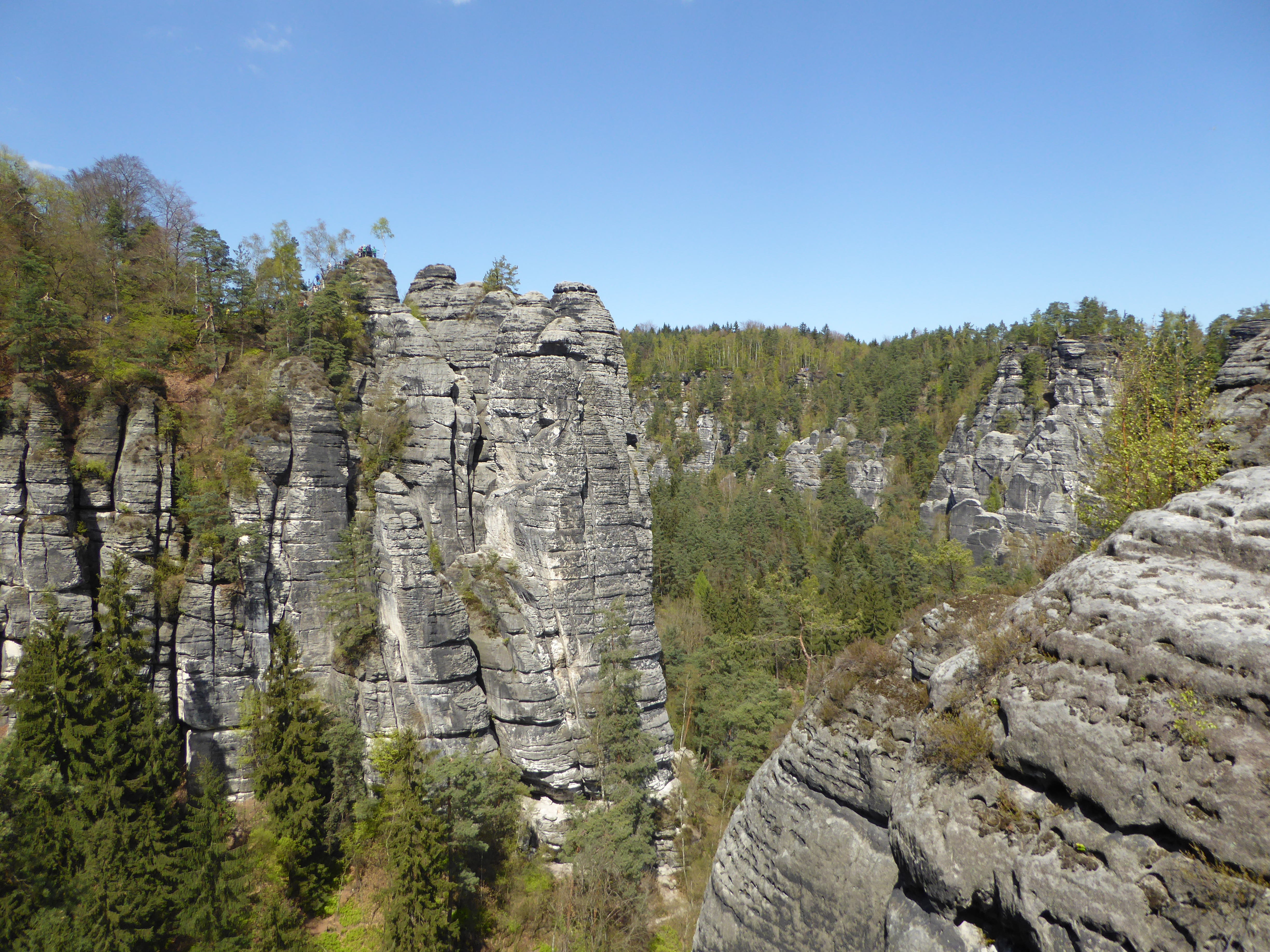 Wehlgrundaussicht im Elbsandsteingebirge